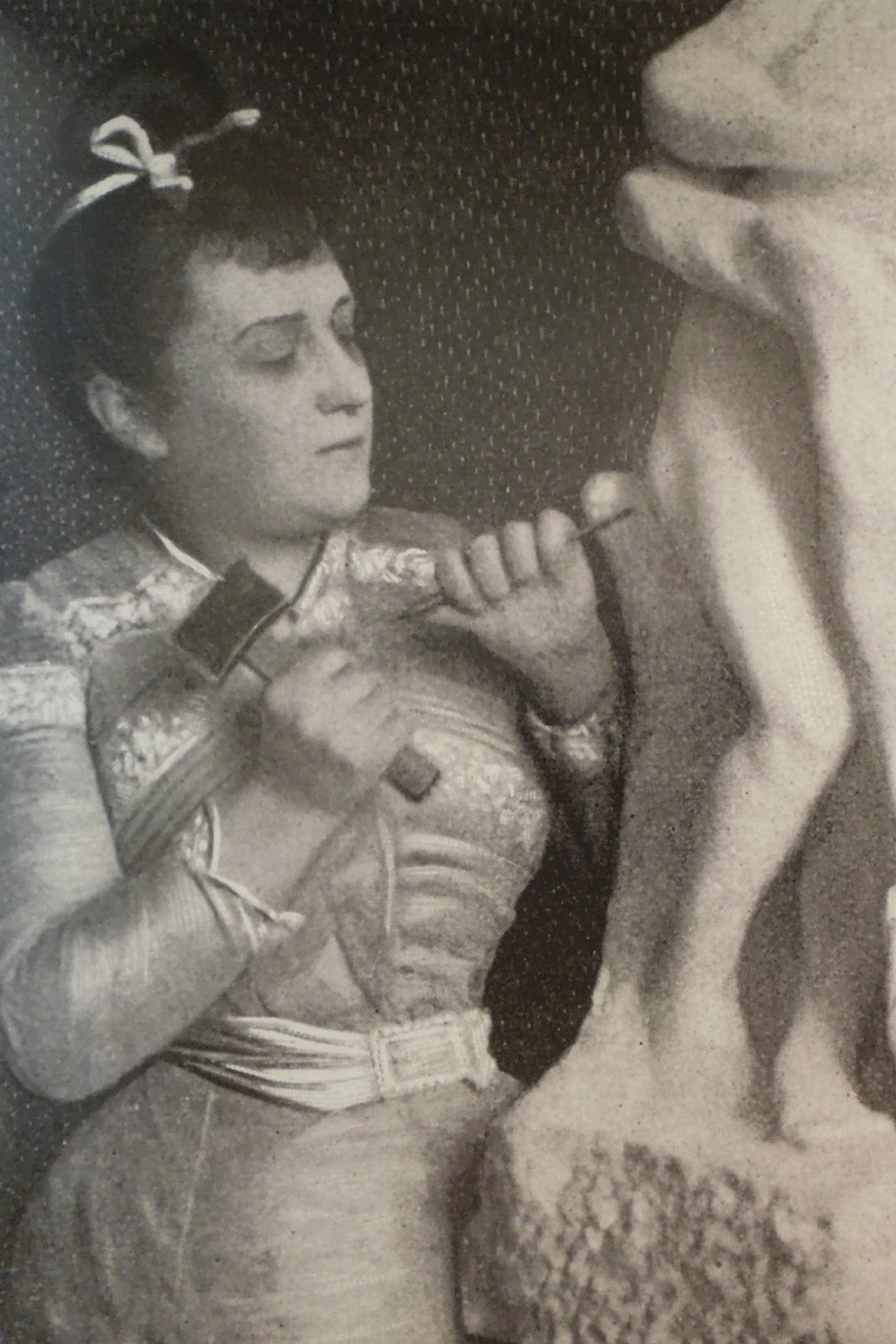 photogravure parue vers 1903